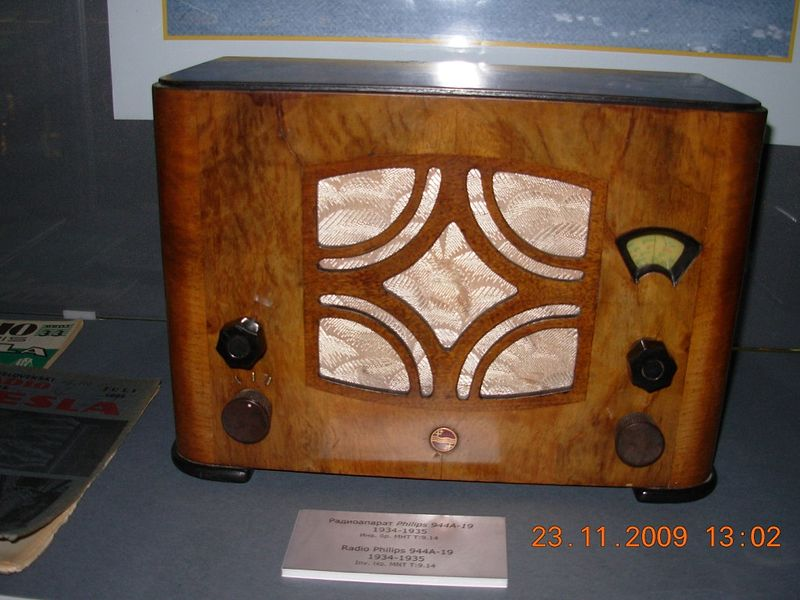 Радиопријемник Филипс из 1934-1935. Фотографисао Голдфингер